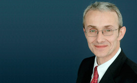 Herr Michael Thielen, Generalsekretär der Konrad-Adenauer-Stiftung e.V.